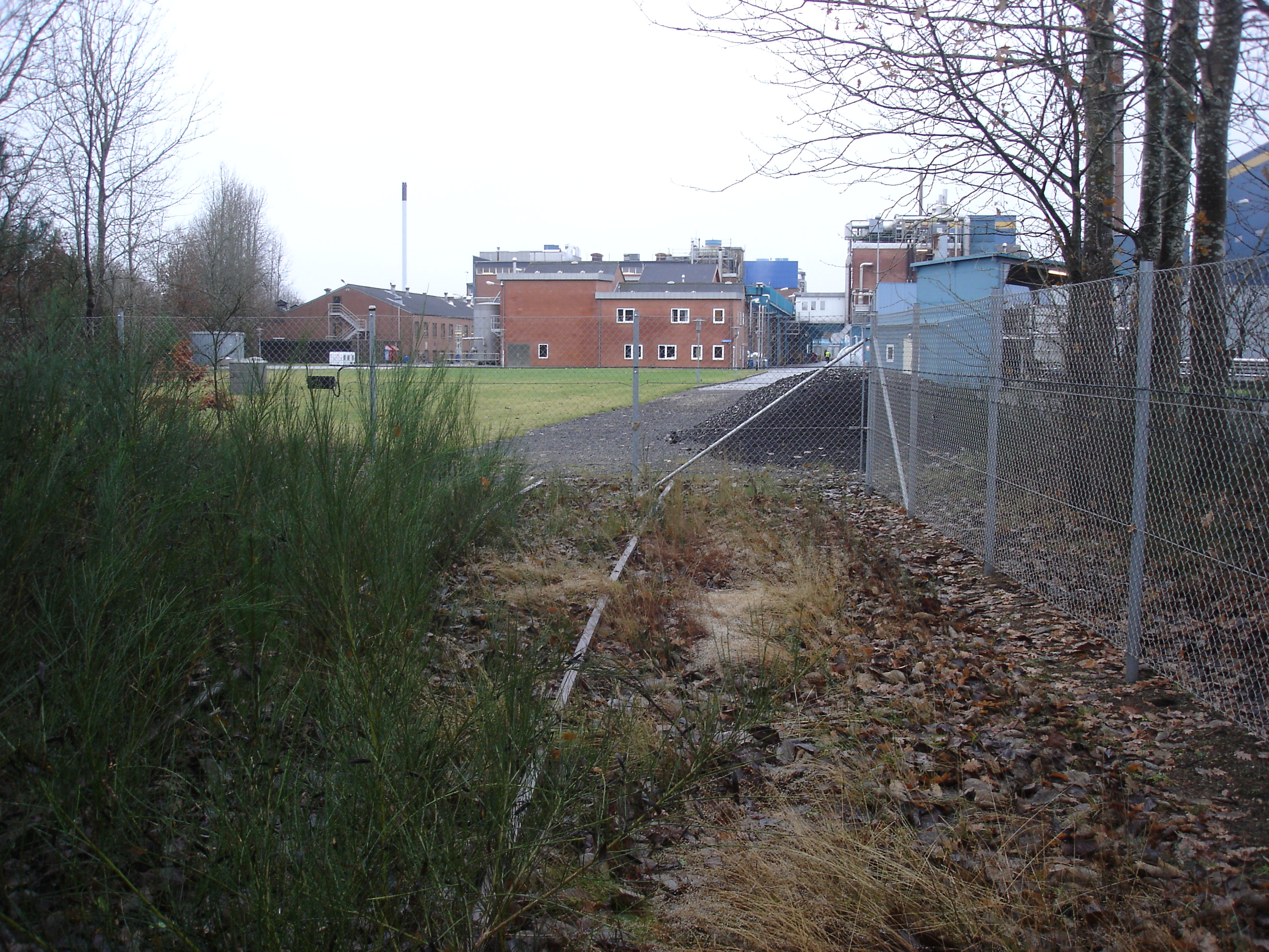 Sidespor til Diagonalbanen inde på DuPonts område